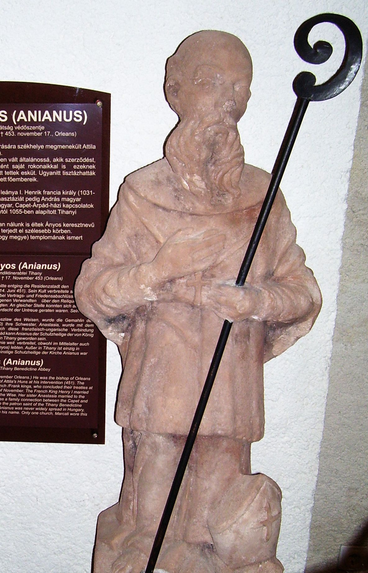 Szent Ányos (Anianus) szobra a Tihanyi Bencés Apátság múzeumában, pásztorbottal és püspöksüveggel a lábnál (1754, ismeretlen veszprémi kőfaragó munkája)